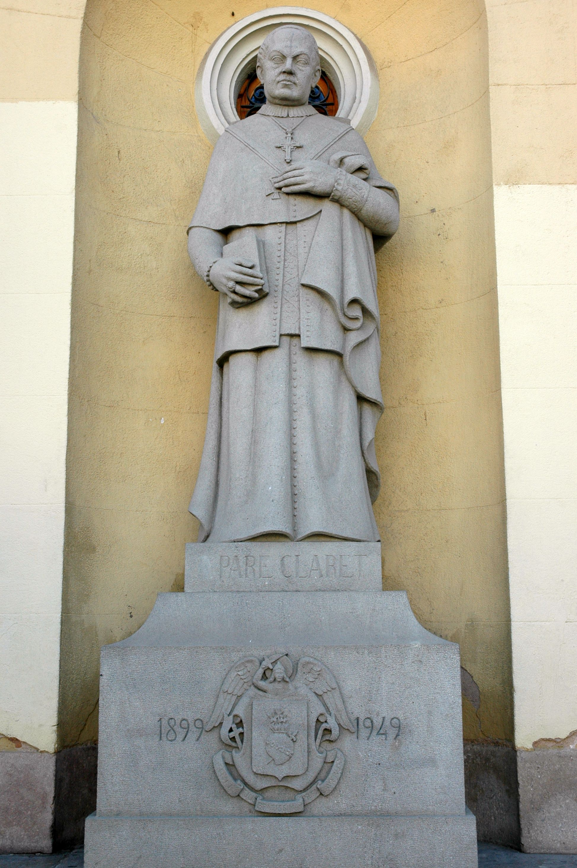 Paret Claret (1807-1870) a l'església vella dels escolapis de Sabadell. Escultura feta l'any 1949